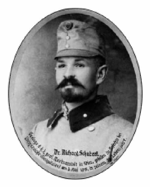 Richard Schubert (1876-1915), sudetoněmecký paleontolog